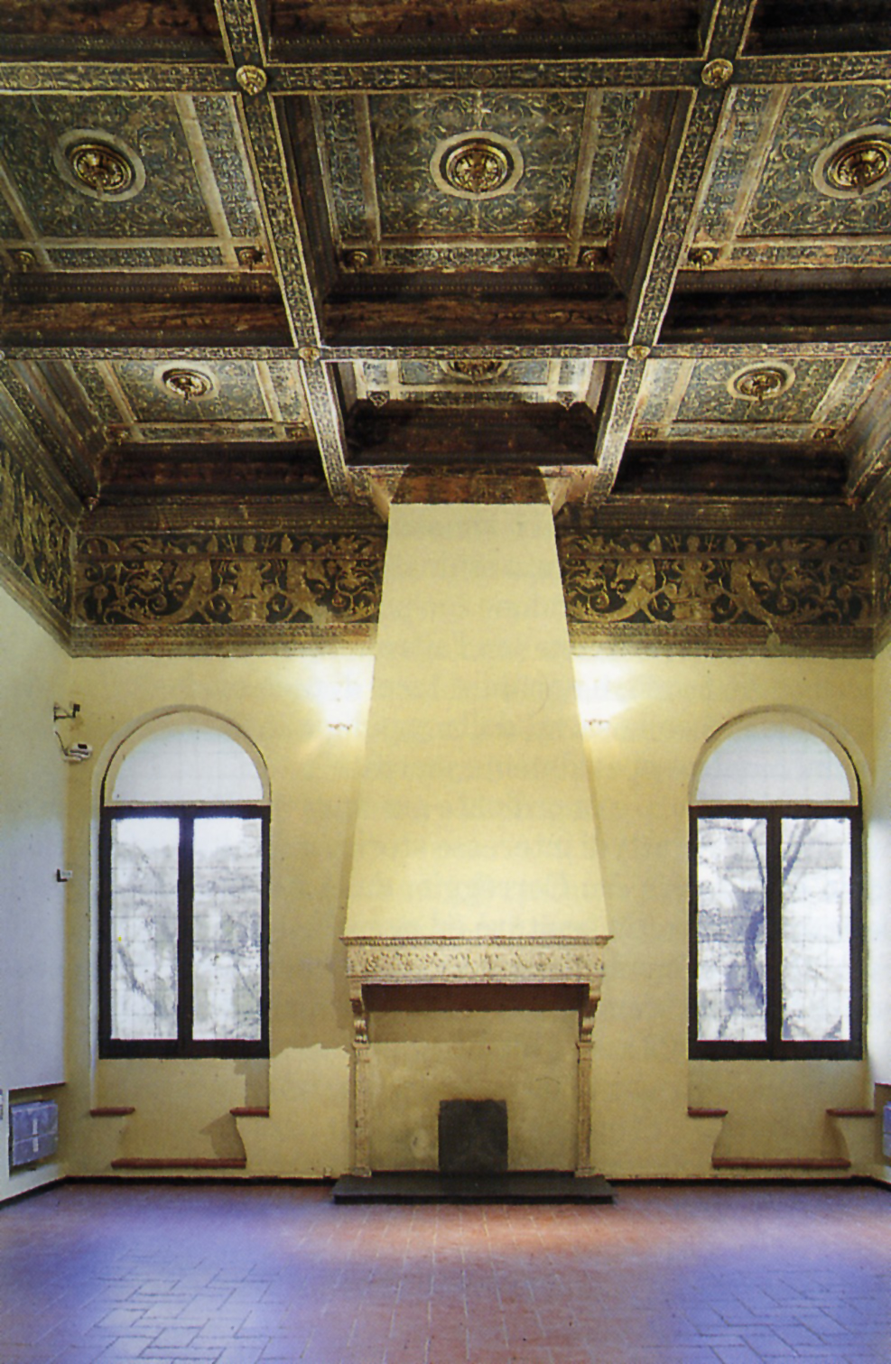 Sala del Camino con il prezioso soffitto cassettonato e il fregio affrescato